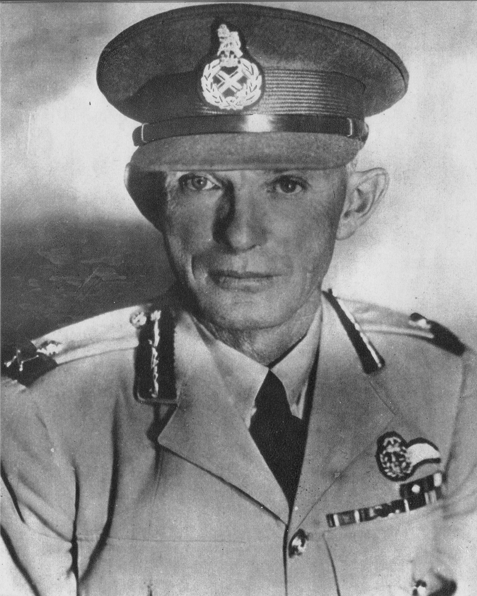 Major-General Dan Pienaar